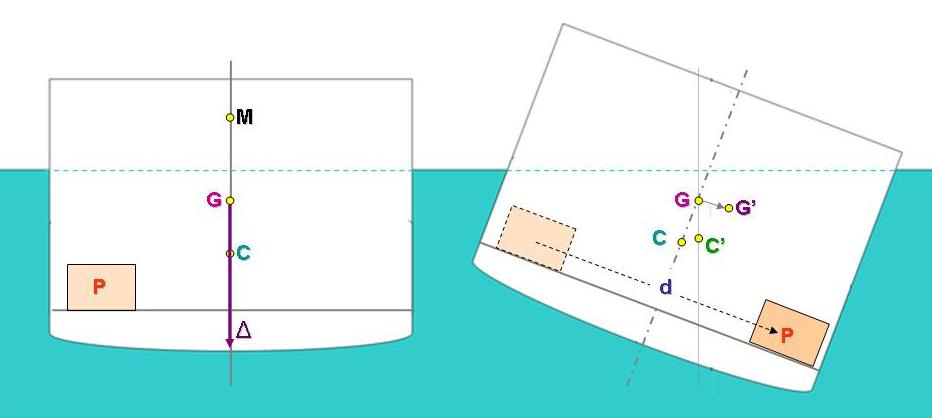 Efectos del traslado horizontal de pesos sobre la estabilidad transversal de un buque.